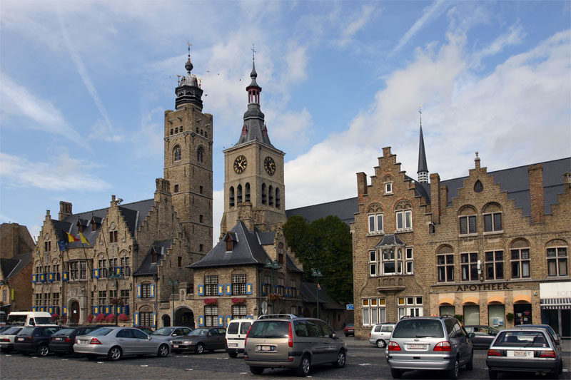 Diksmuide (Belgium): Markt, Town Hall, Saint Nicholas Church